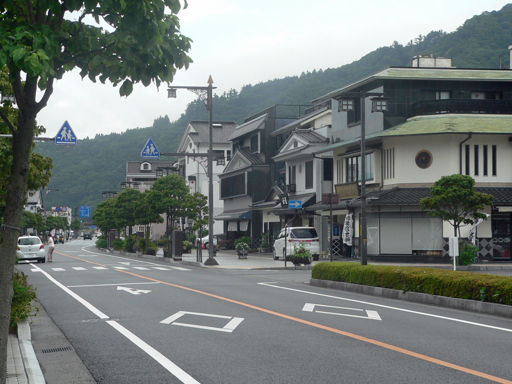 Minobu_Syonin_dori.